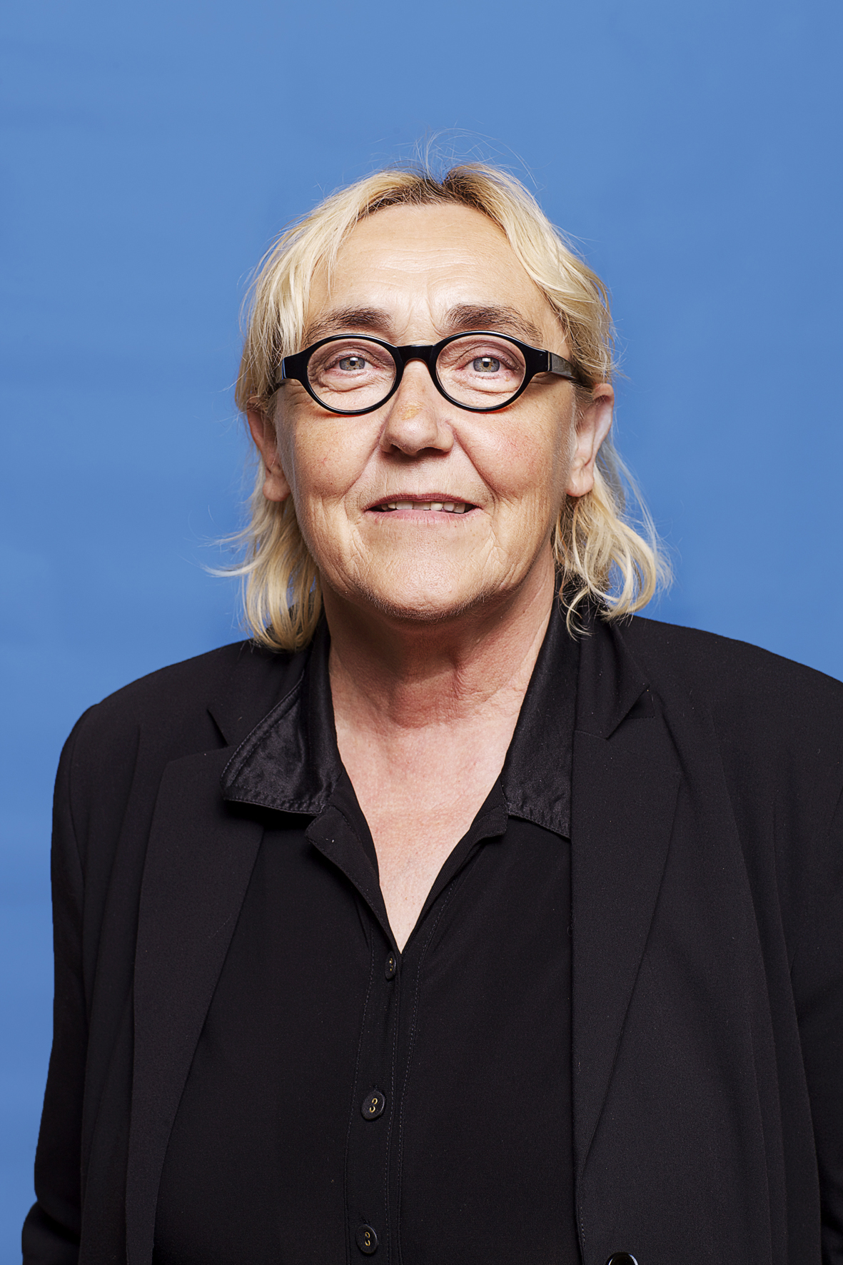 Lutz Jacobi, Tweede Kamerlid. Foto: Lex Draijer.